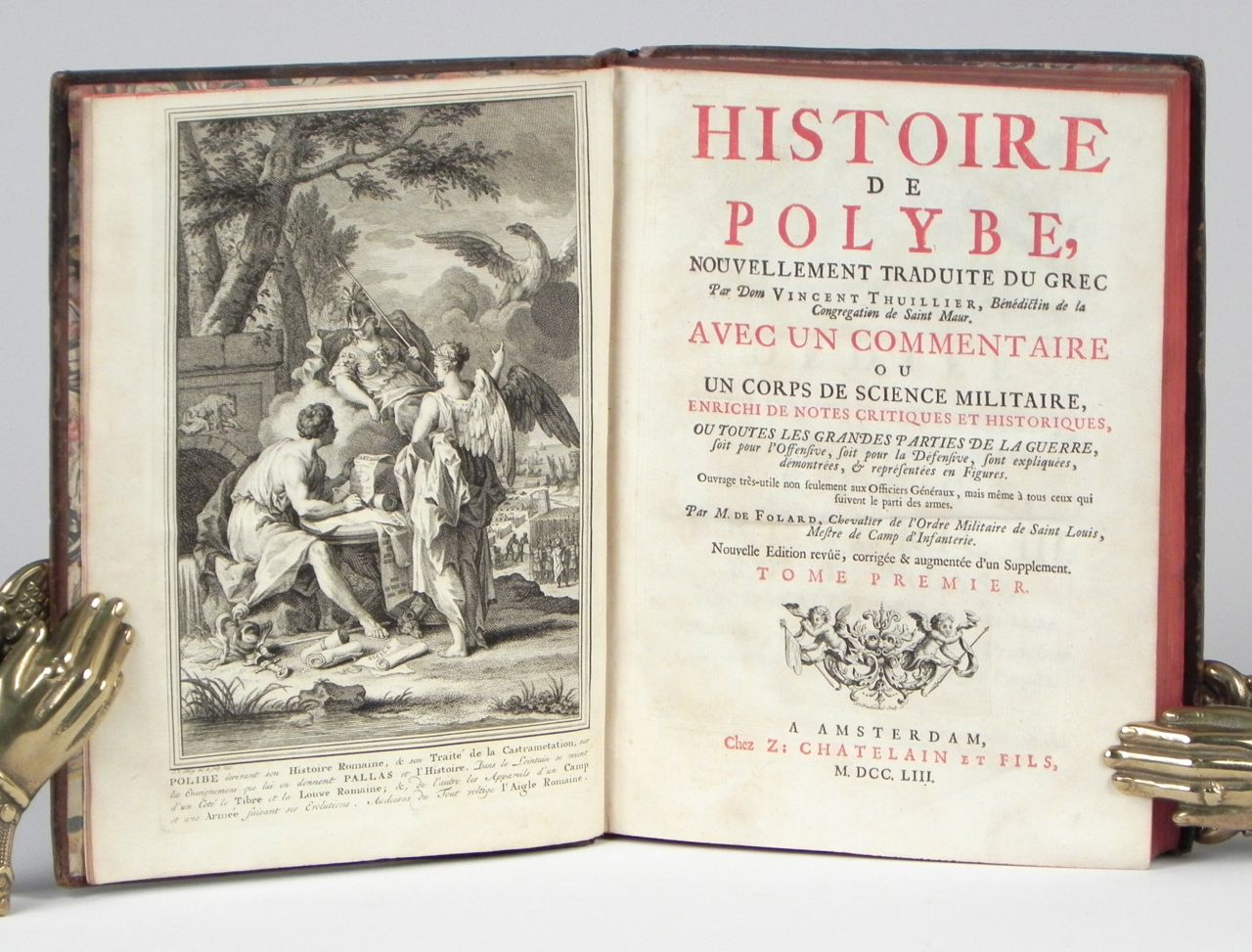 Page de titre de l' Histoire de Polybe, traduction de Dom Vincent Thuillier, édition de 1753, Amsterdam.